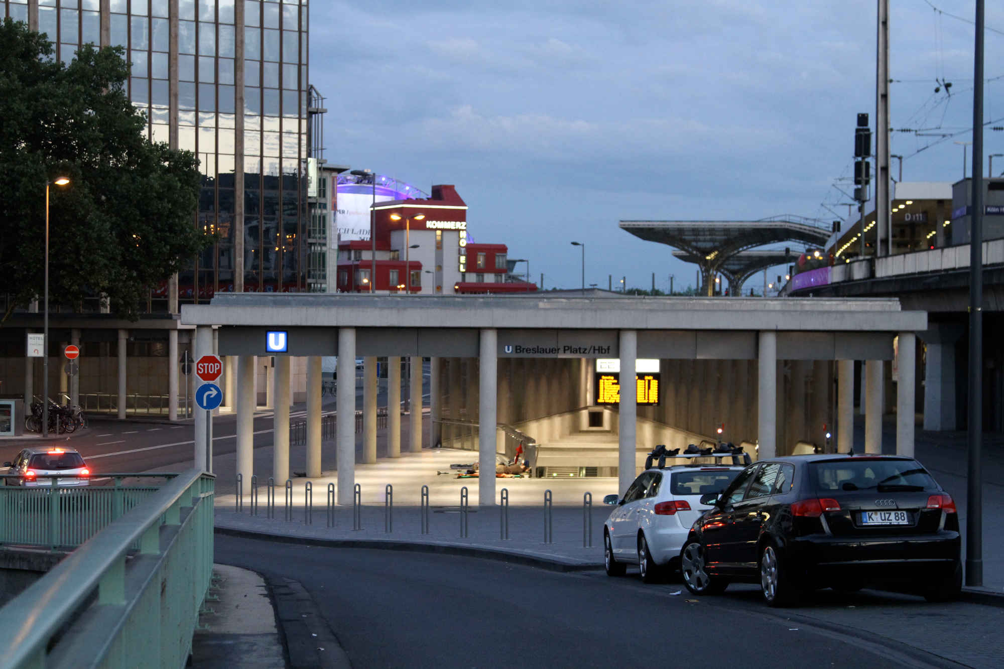 U-Bahn-Haltestelle Breslauer Platz / Hauptbahnhof, Köln